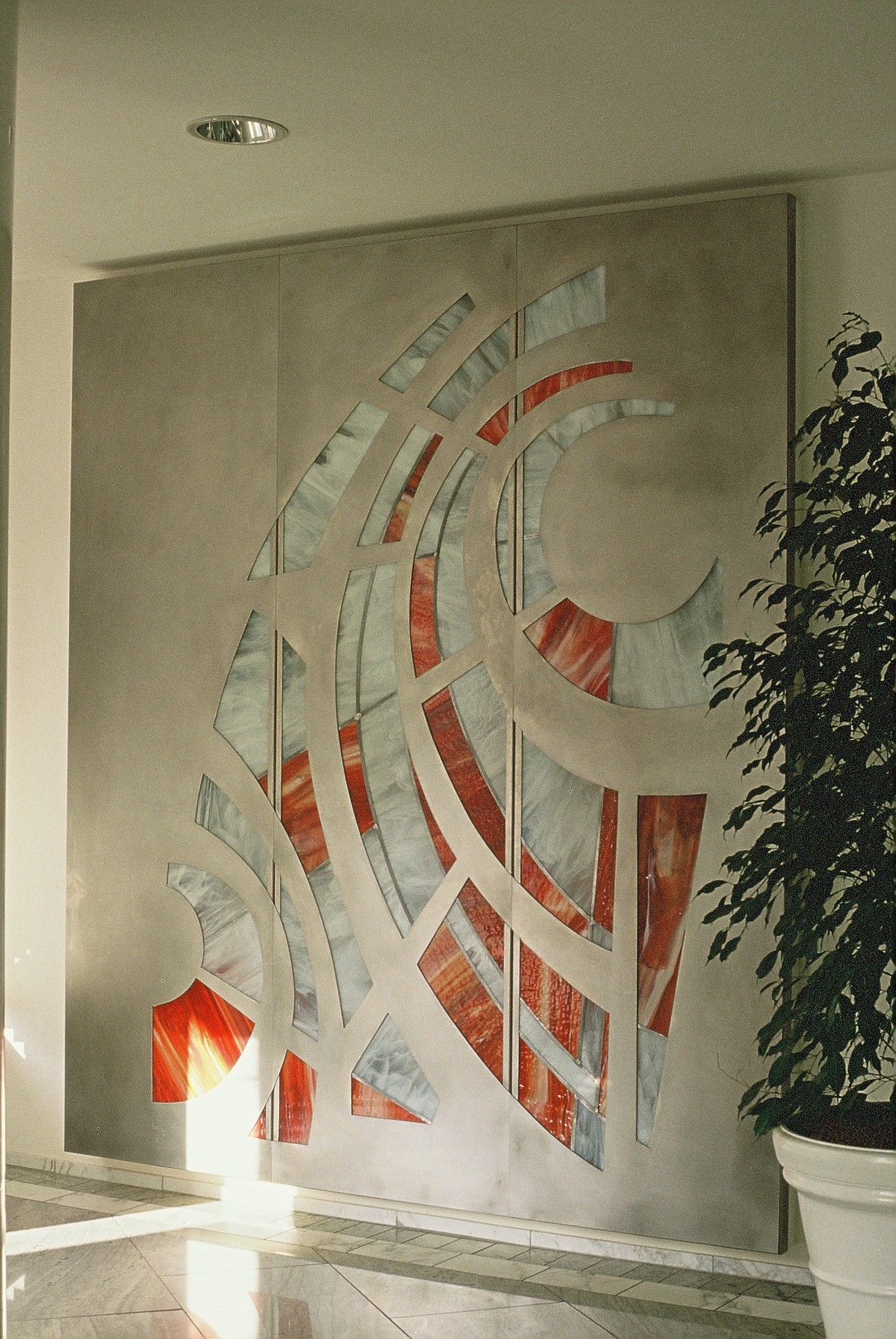 Kunstwerk Edelstahl mit Opalescentglas 250 cm x 220 cm